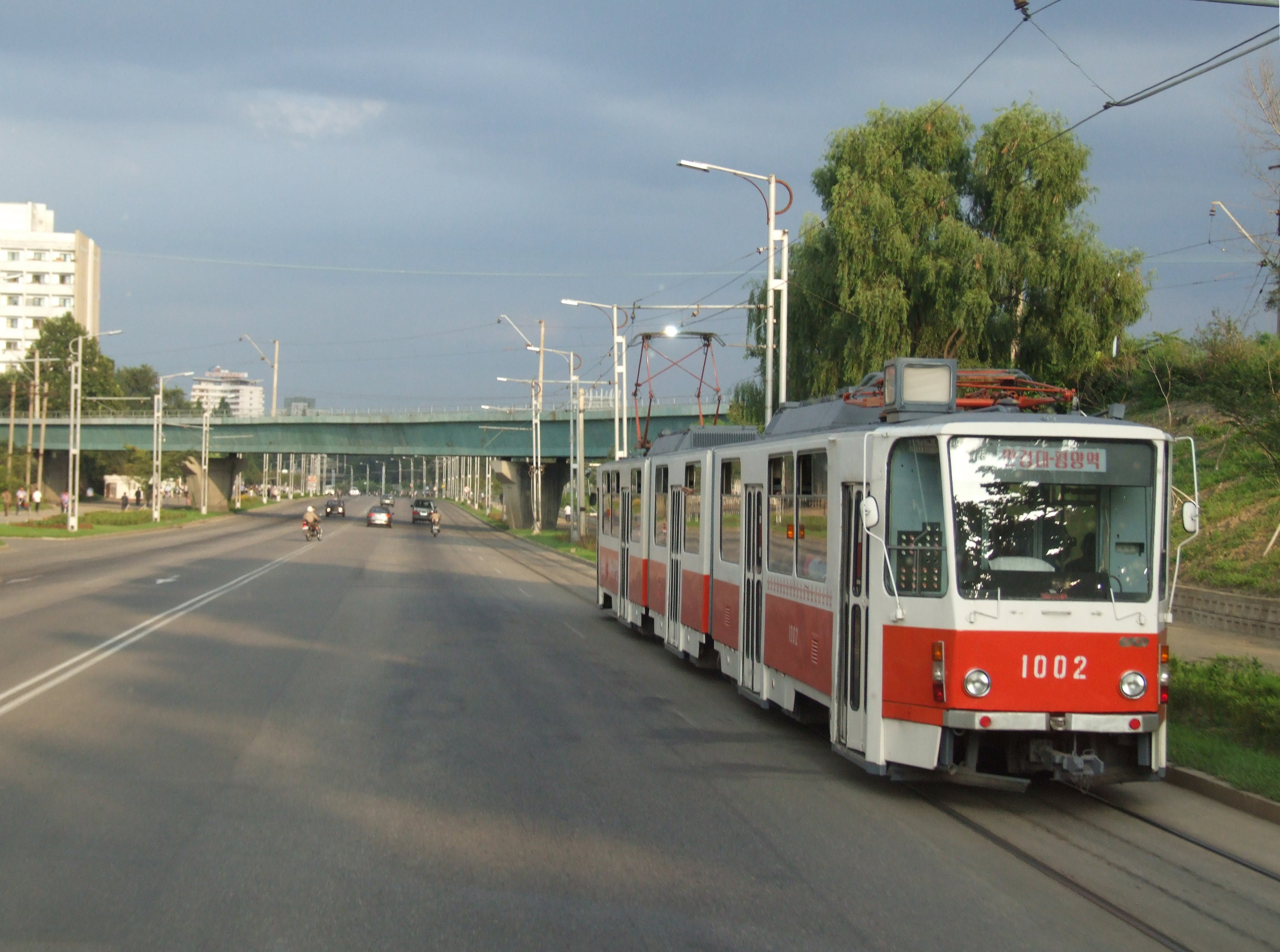 Straßenbahn in Pjöngjang